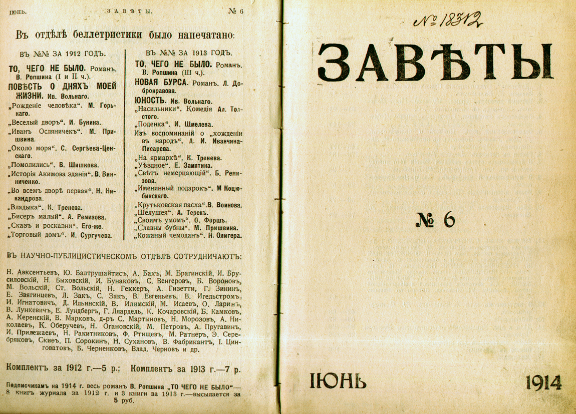 Журнал "Заветы", титульный лист